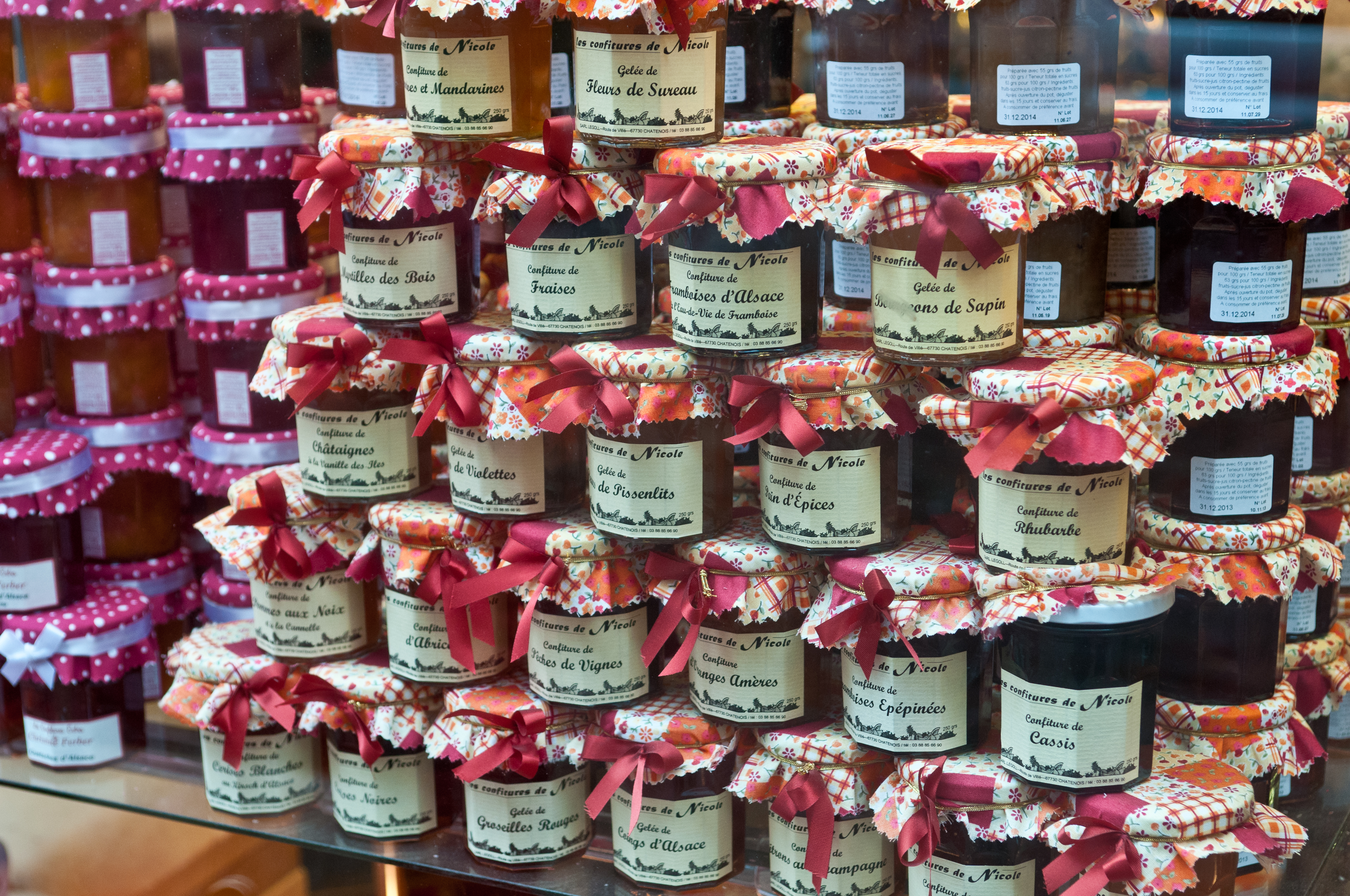 Colmar